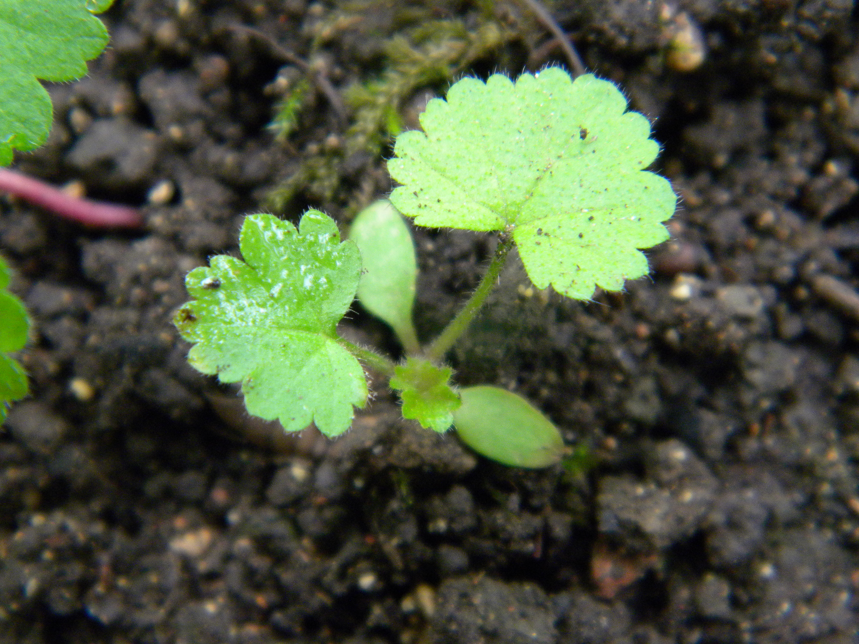 Urba geumo, plantido